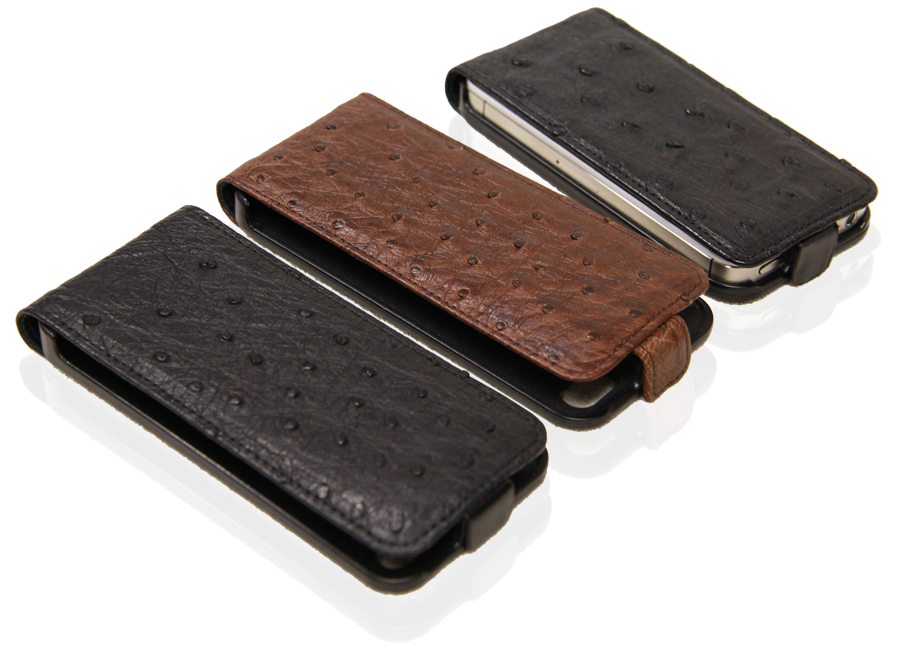 Aufklappbare Schutzhüllen für Smartphones aller Art.